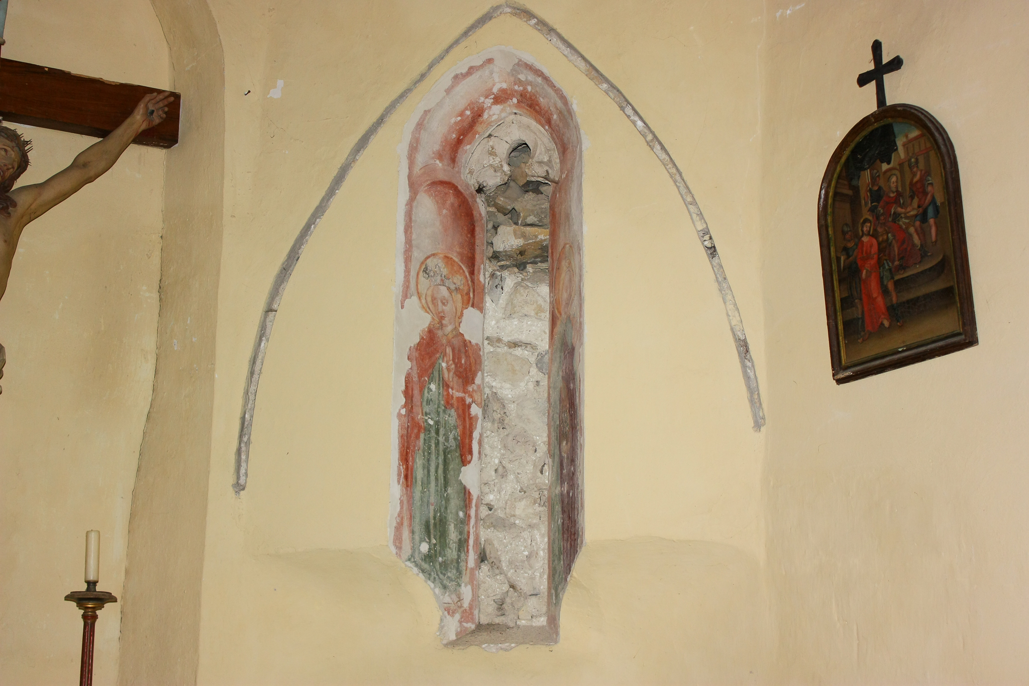 Cerkev Sv. Križa (2) gotsko okno